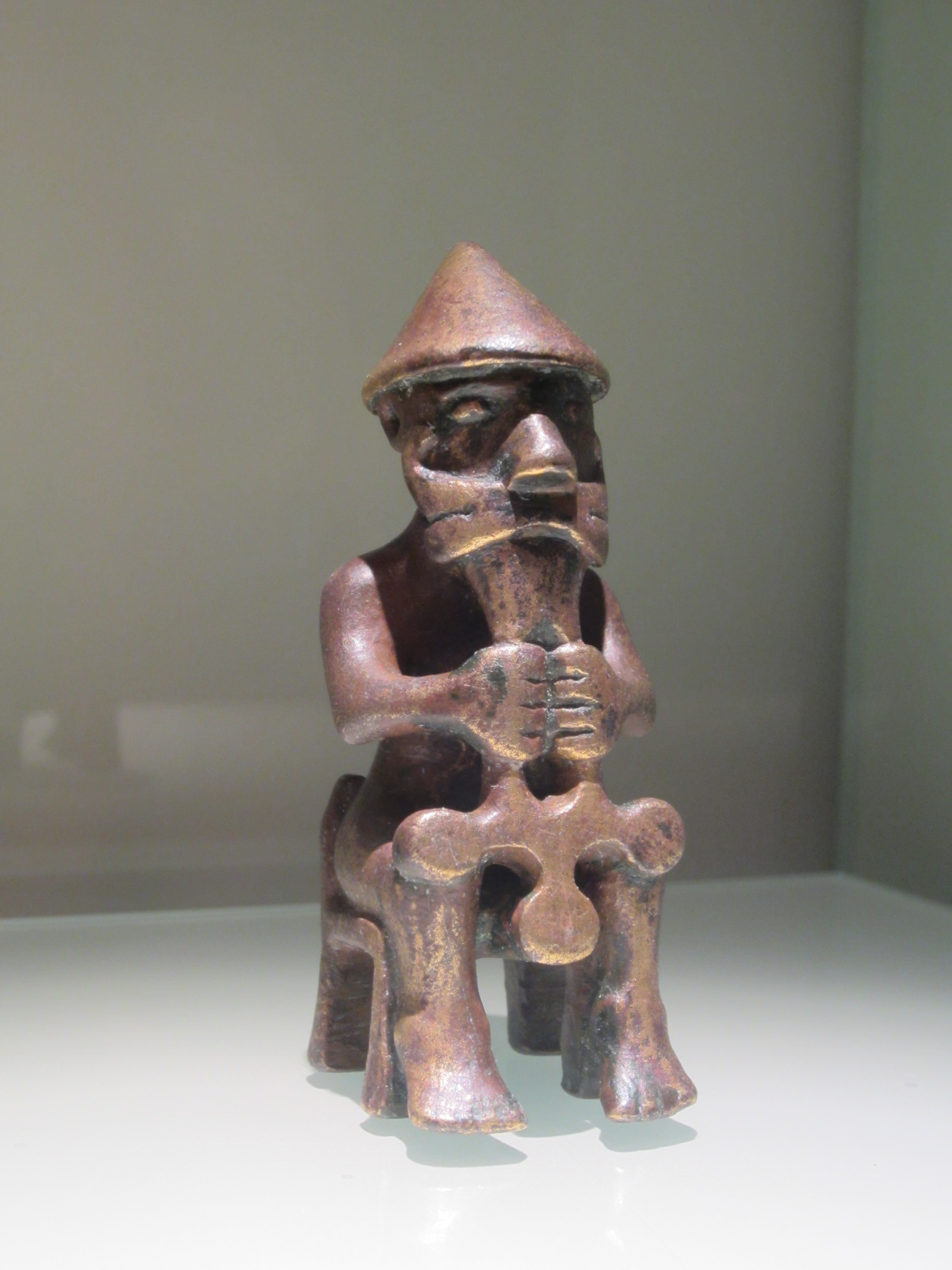 Bronzestatue „Christ or Þor“ aus dem isländischen Nationalmuseum